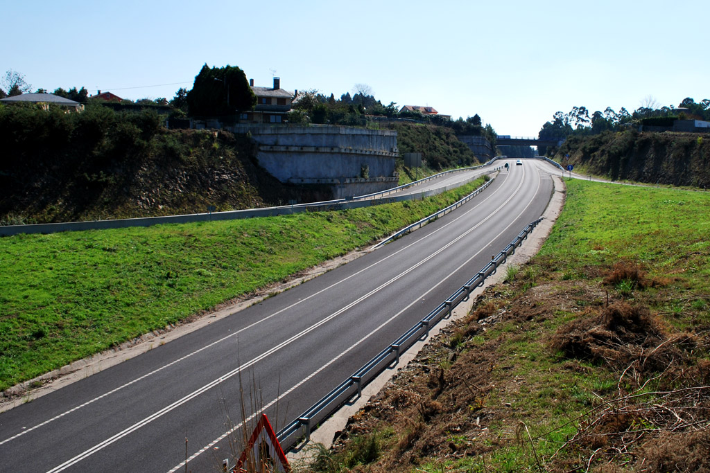 Vía Ártabra. Parroquia de Dorneda (Oleiros), desde a parroquia de Maianca